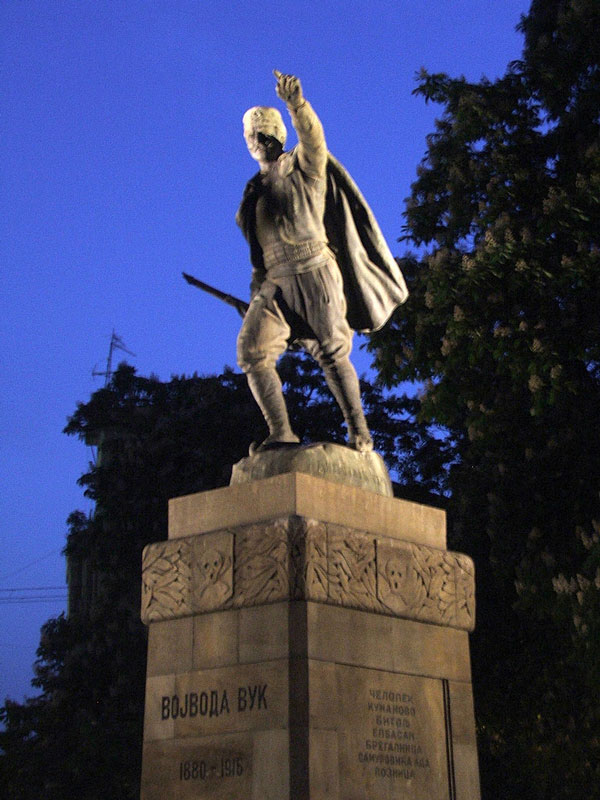 Паметник на Войн Попович, Топличин венец, Белград.